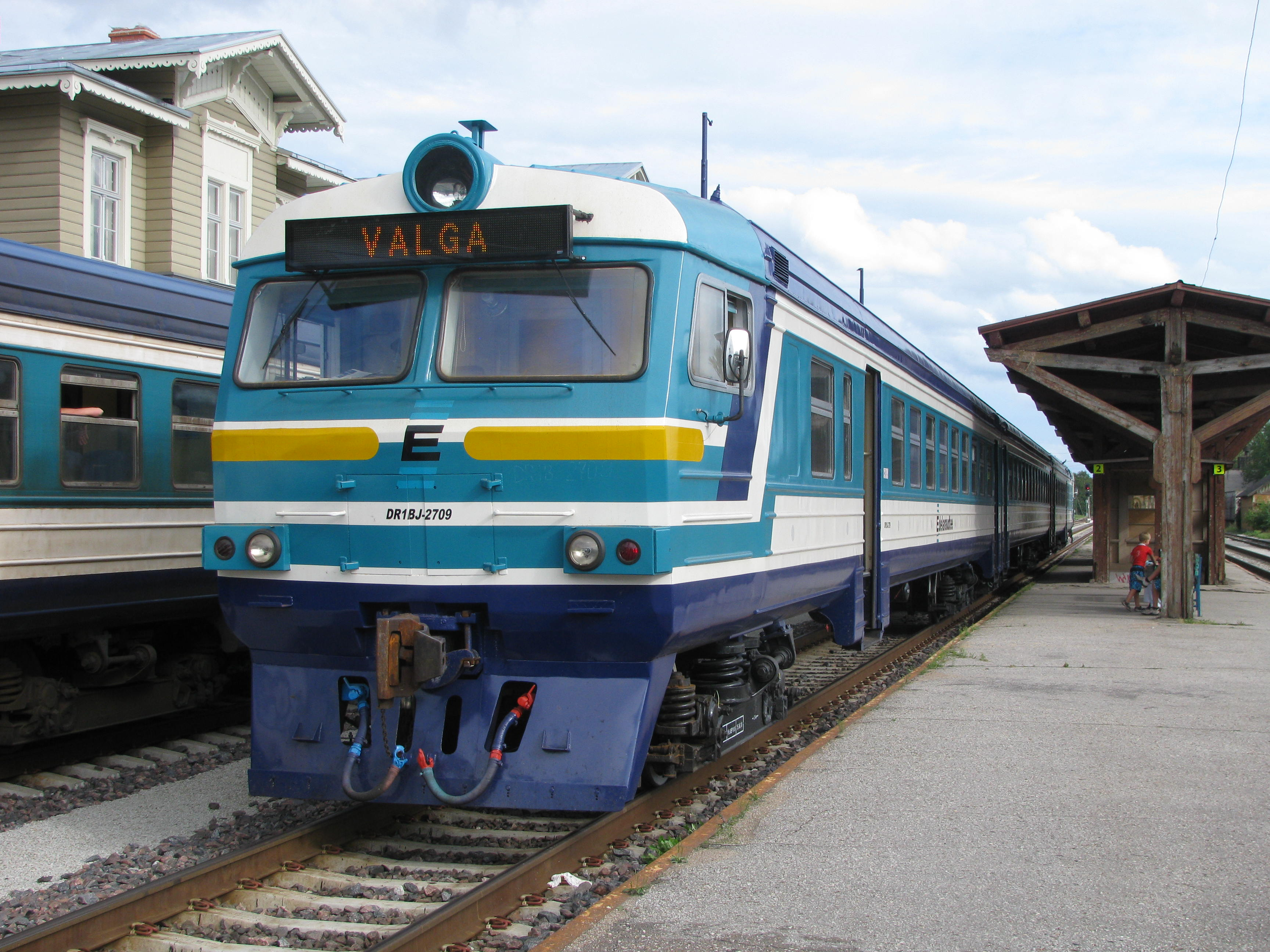 Motorová jednotka společnosti Edelaraudtee s motorovým vozem DR1BJ-2709 ve stanici Tartu